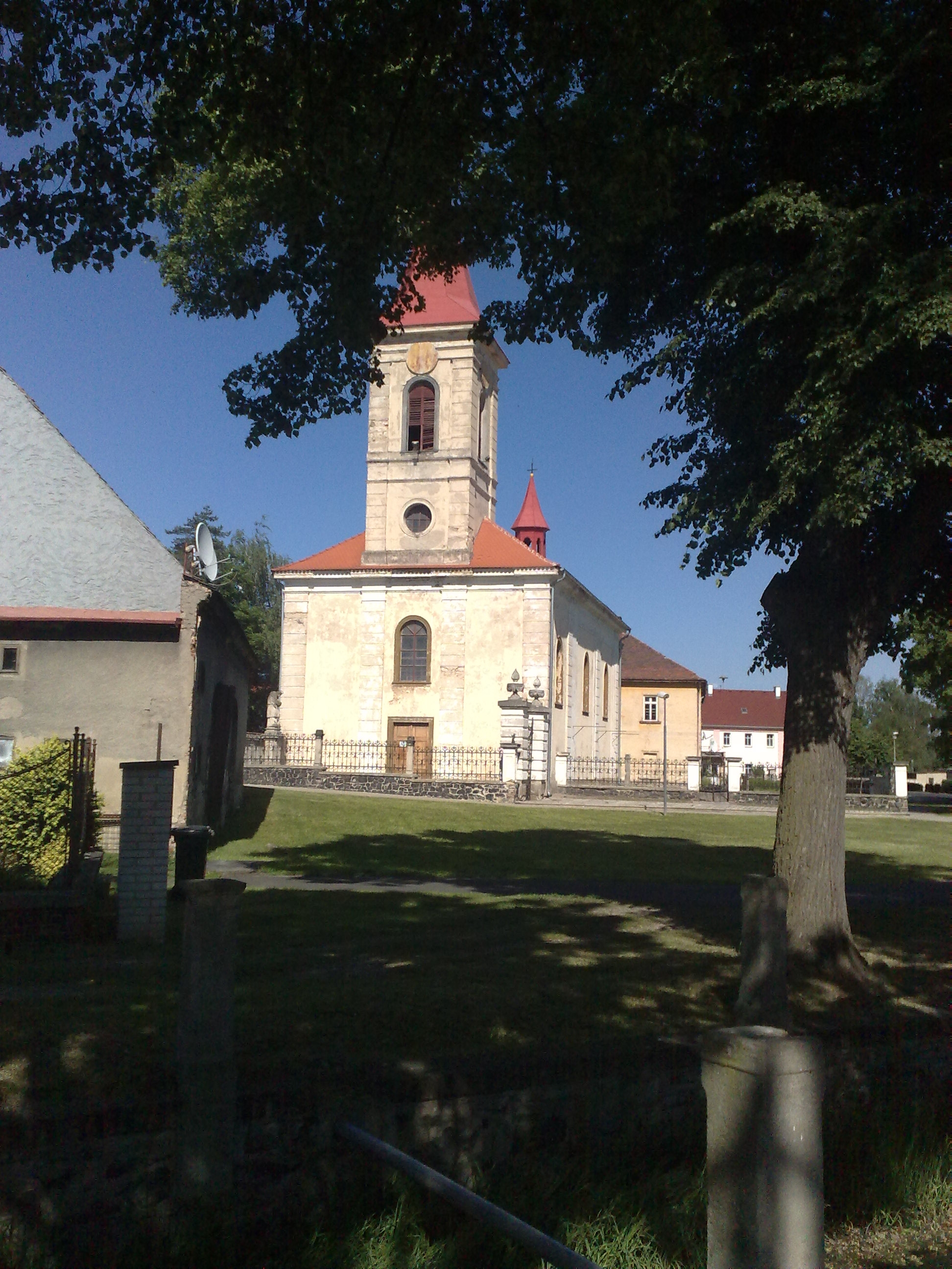 Kostel svatého Apolináře v obci Modlany na Teplicku.